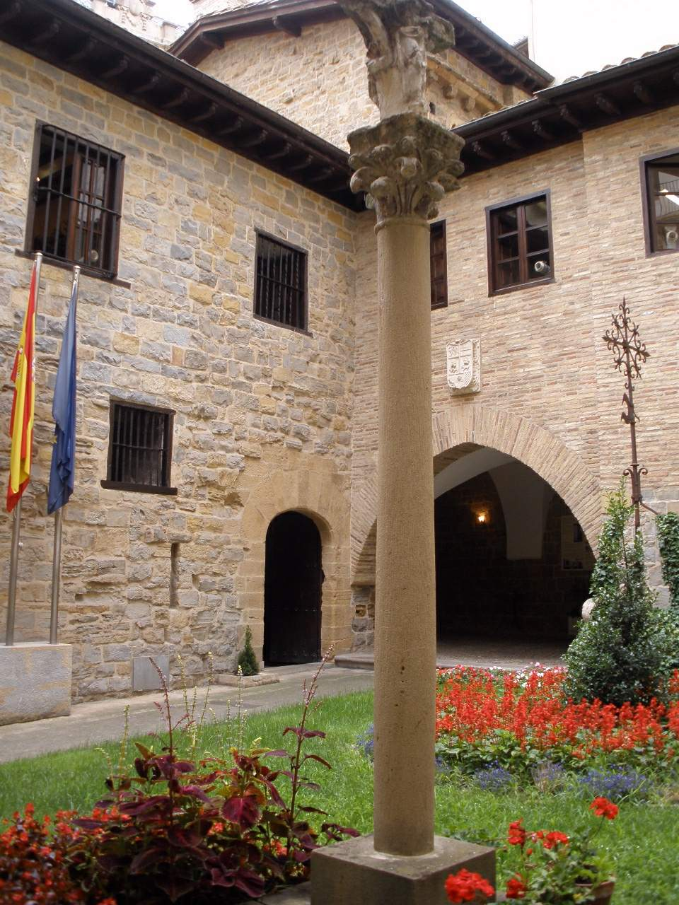 Pamplona - Cámara de Comptos de Navarra